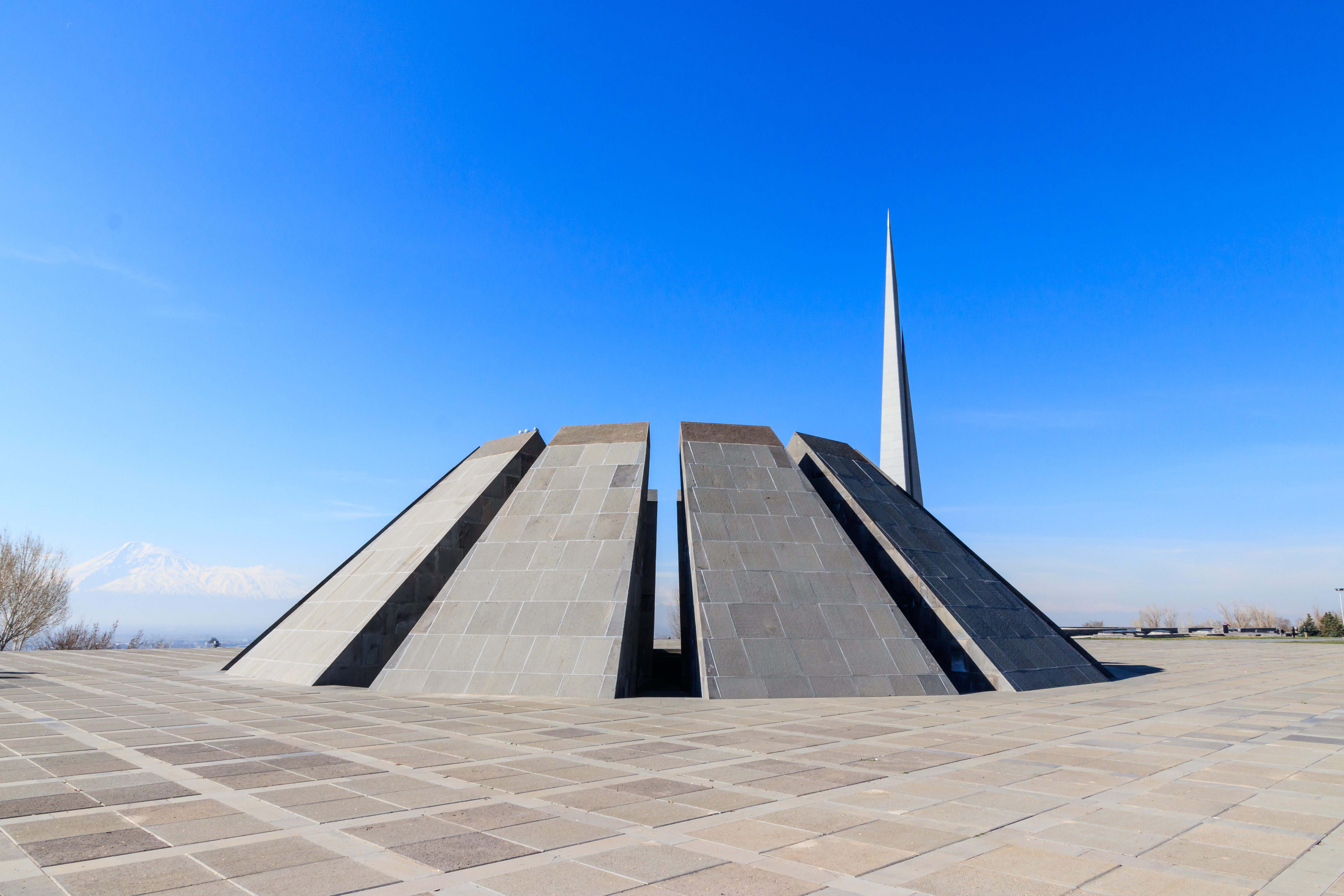 Tsitsernakaberd